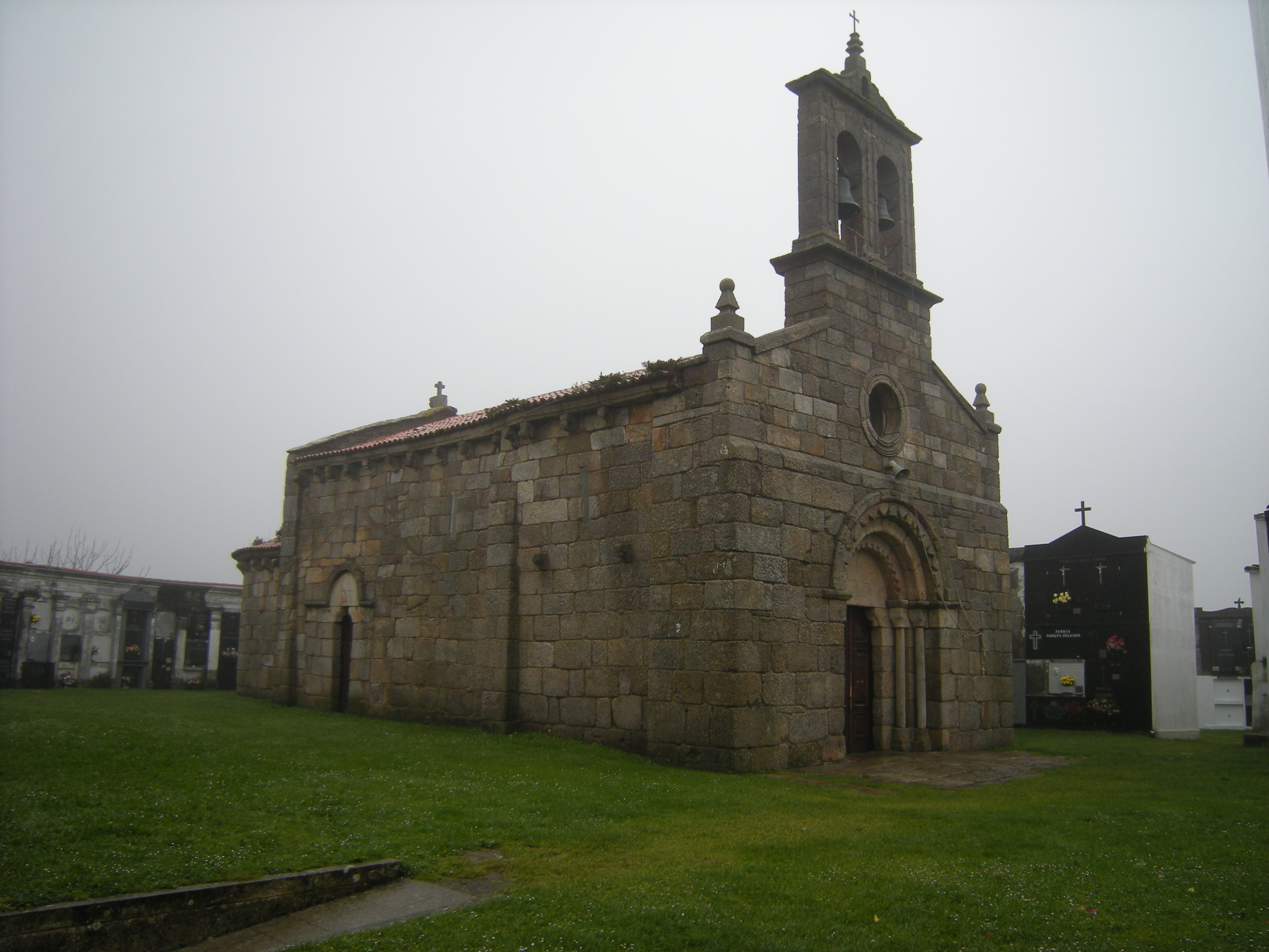 Igrexa de Santa María de Dexo, Oleiros